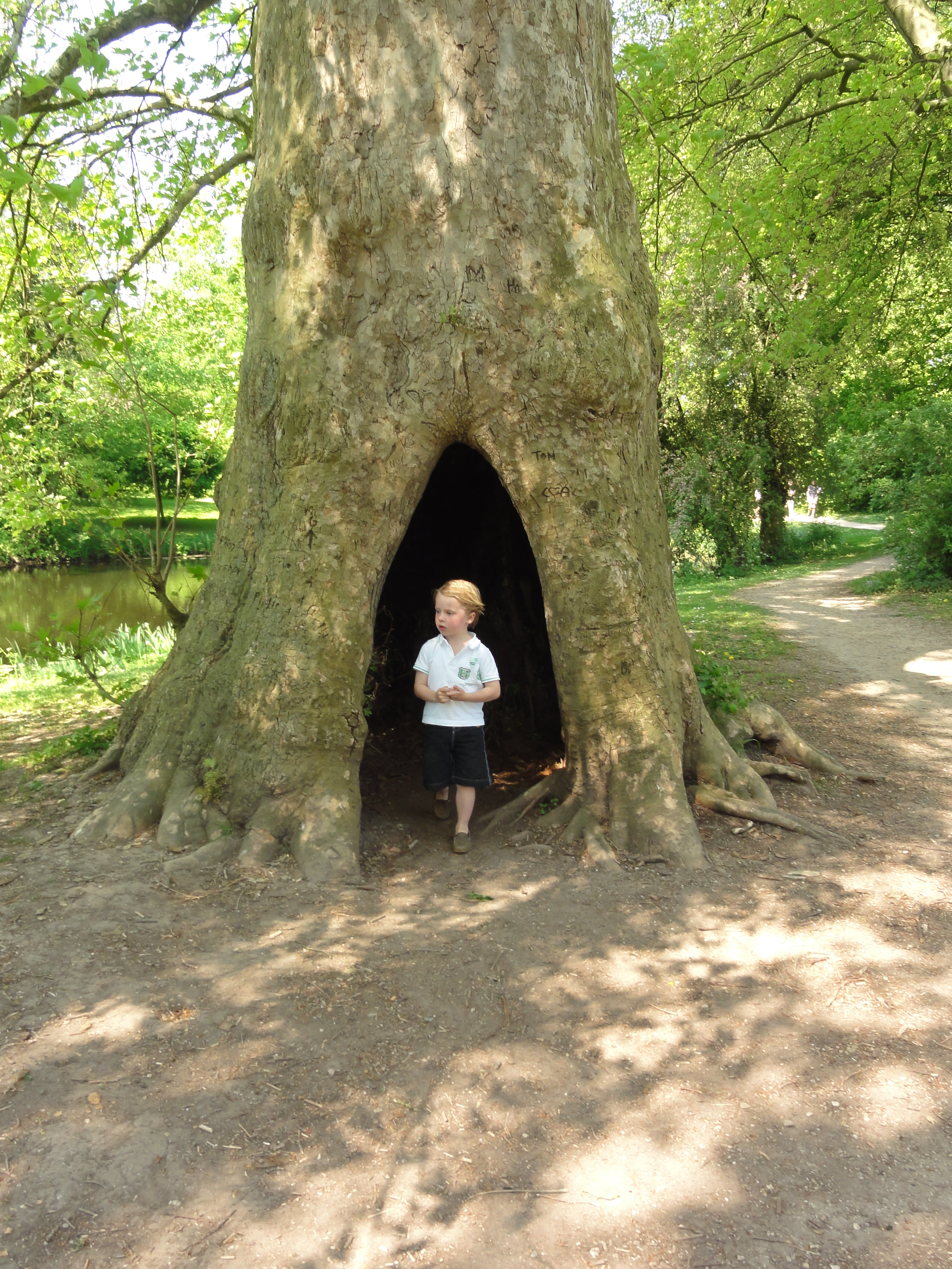 Hemmen (Overbetuwe) holle boom bij kasteelruïne..